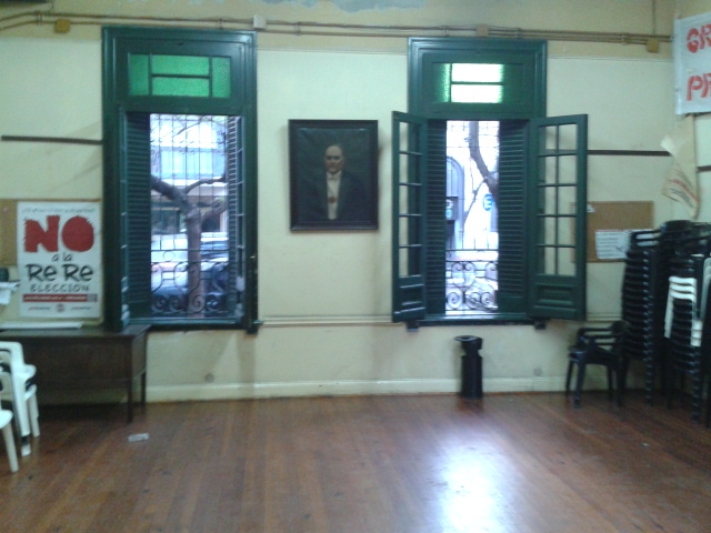 Interior de un comité radical en Buenos Aires